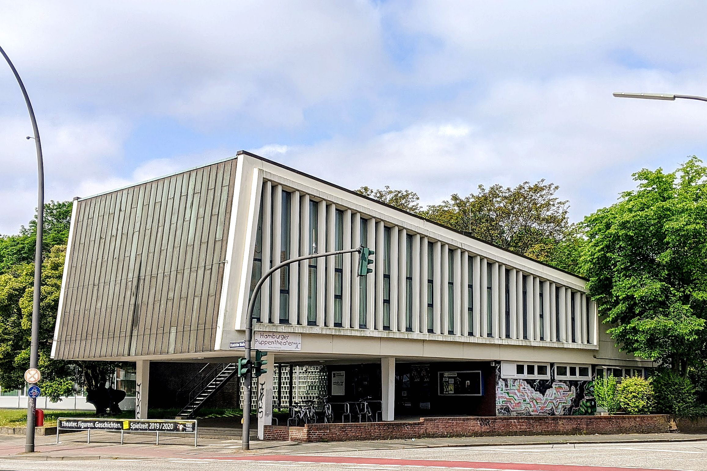 Haus Flachsland in Hamburg-Barmbek, ehem. Haus der Jugend, heute Spielstätte für Puppentheater und Hamburger Konservatorium, unter Denkmalschutz